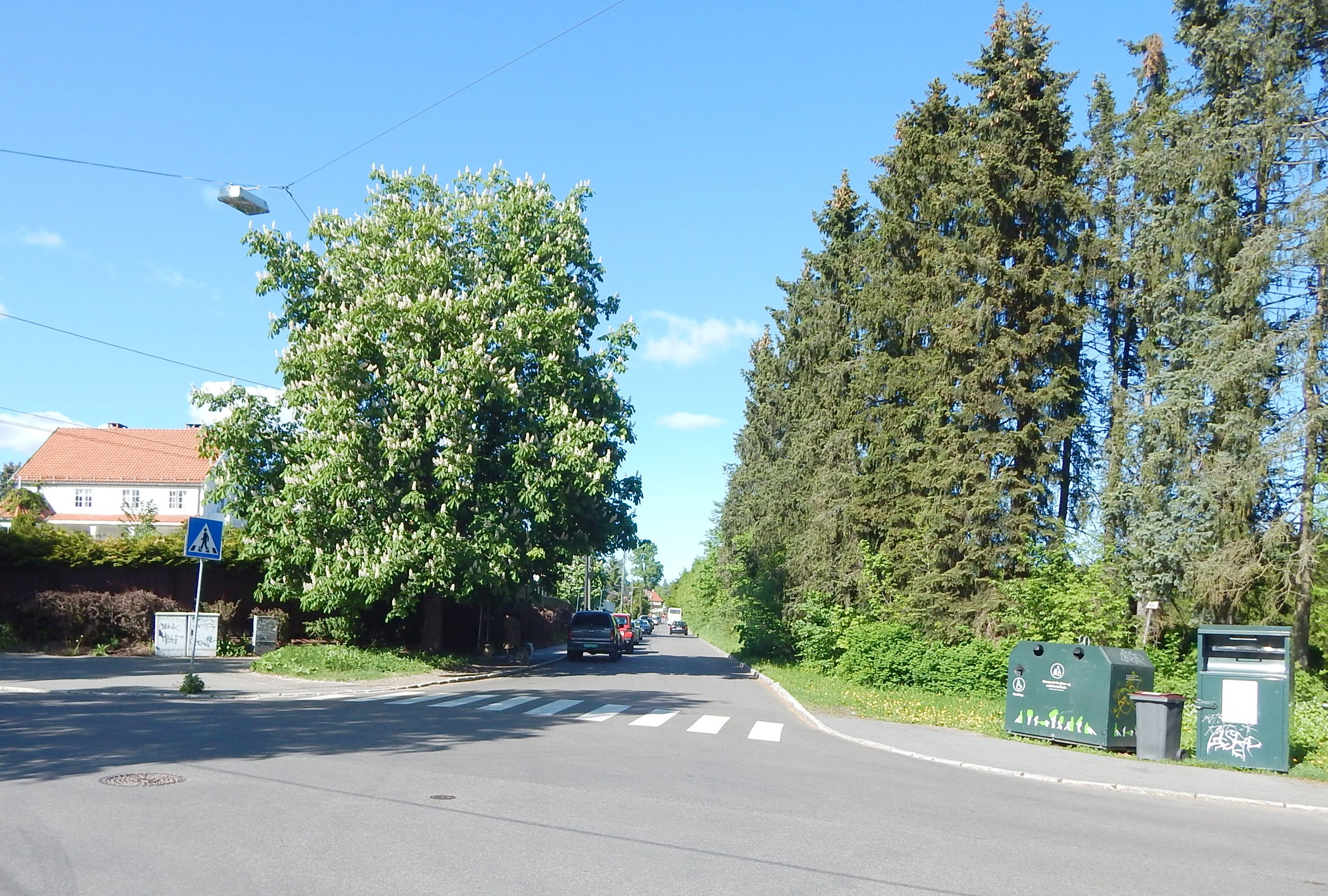 Skøyenveien nordøstover fra Monolitveien